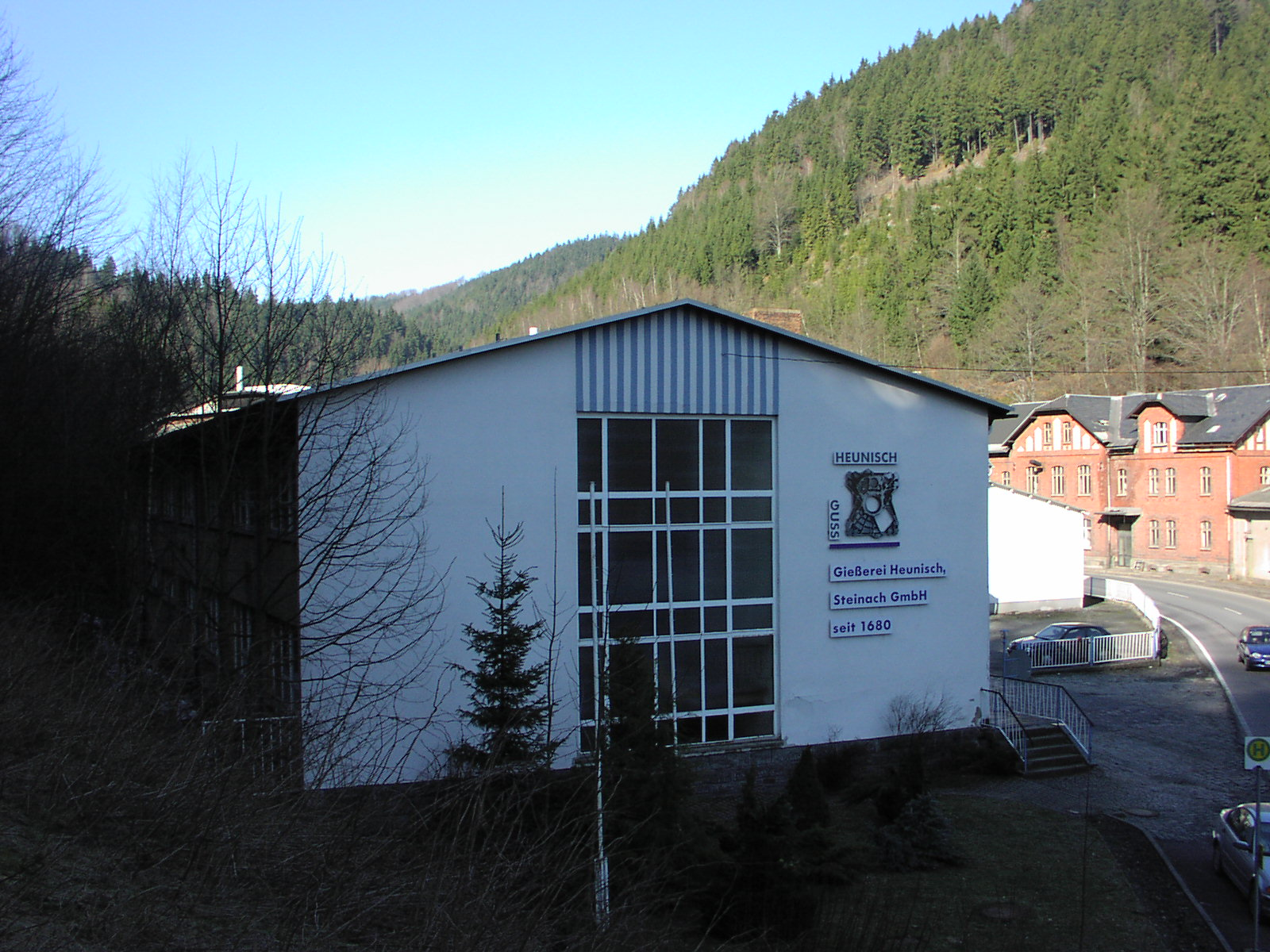 Giesserei Heunisch Steinach, Deutschland